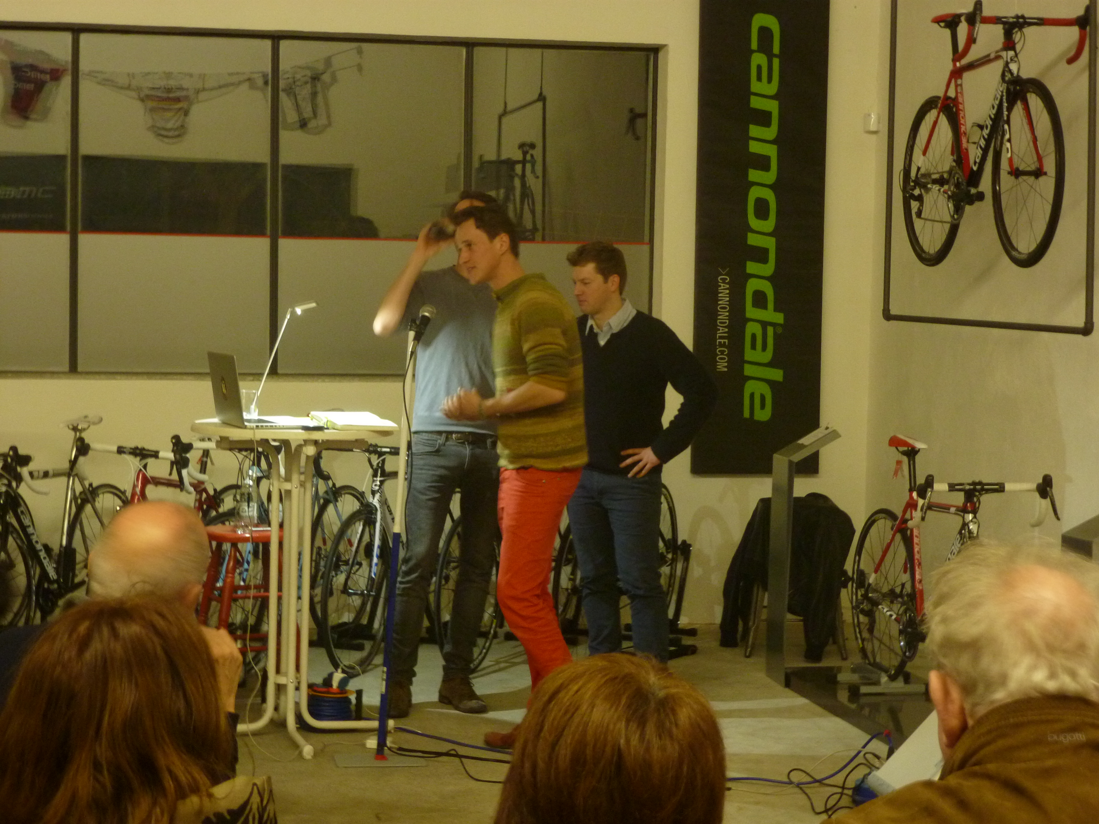 Vortragsreihe